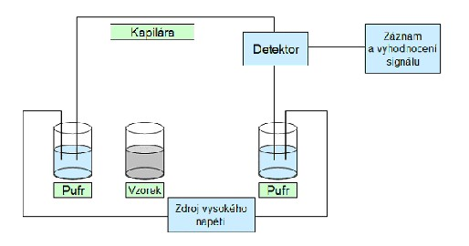 Instrumentace kapilární zónové elektroforézy. Kapilára je ponořena do vialek (zásobníky s elektrolytem), na kapiláře je prováděna on-line detekce. Celý systém je propojen párem elektrod (většinou jsou zhotoveny z Pt či ze slitina Pt a Ir) ke zdoji vysokého napětí (0 až 30 kV). Detektor je spojen s počítačem pro vyhodnocování záznamů.